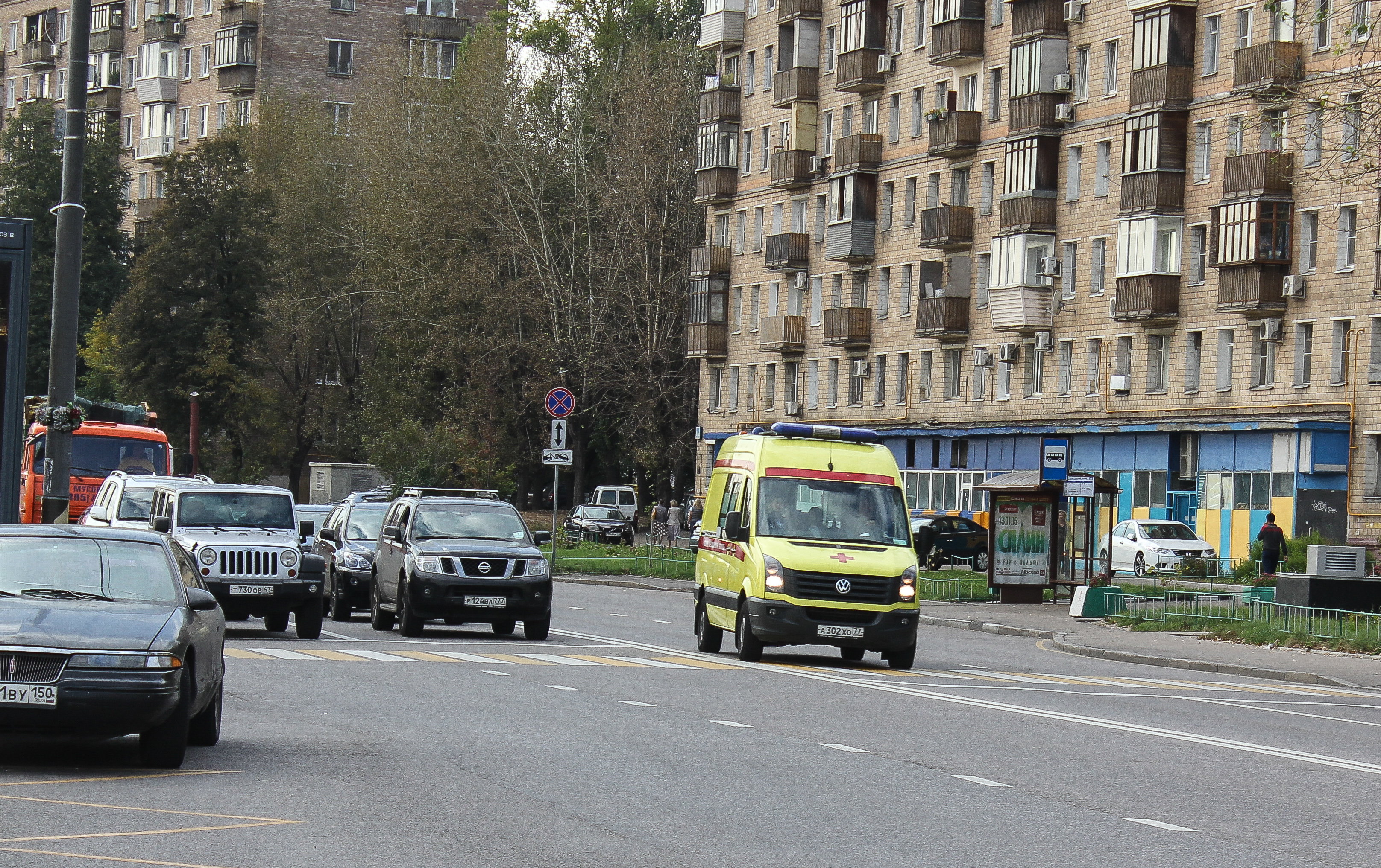 Машина скорой помощи, едущая по встречной полосе